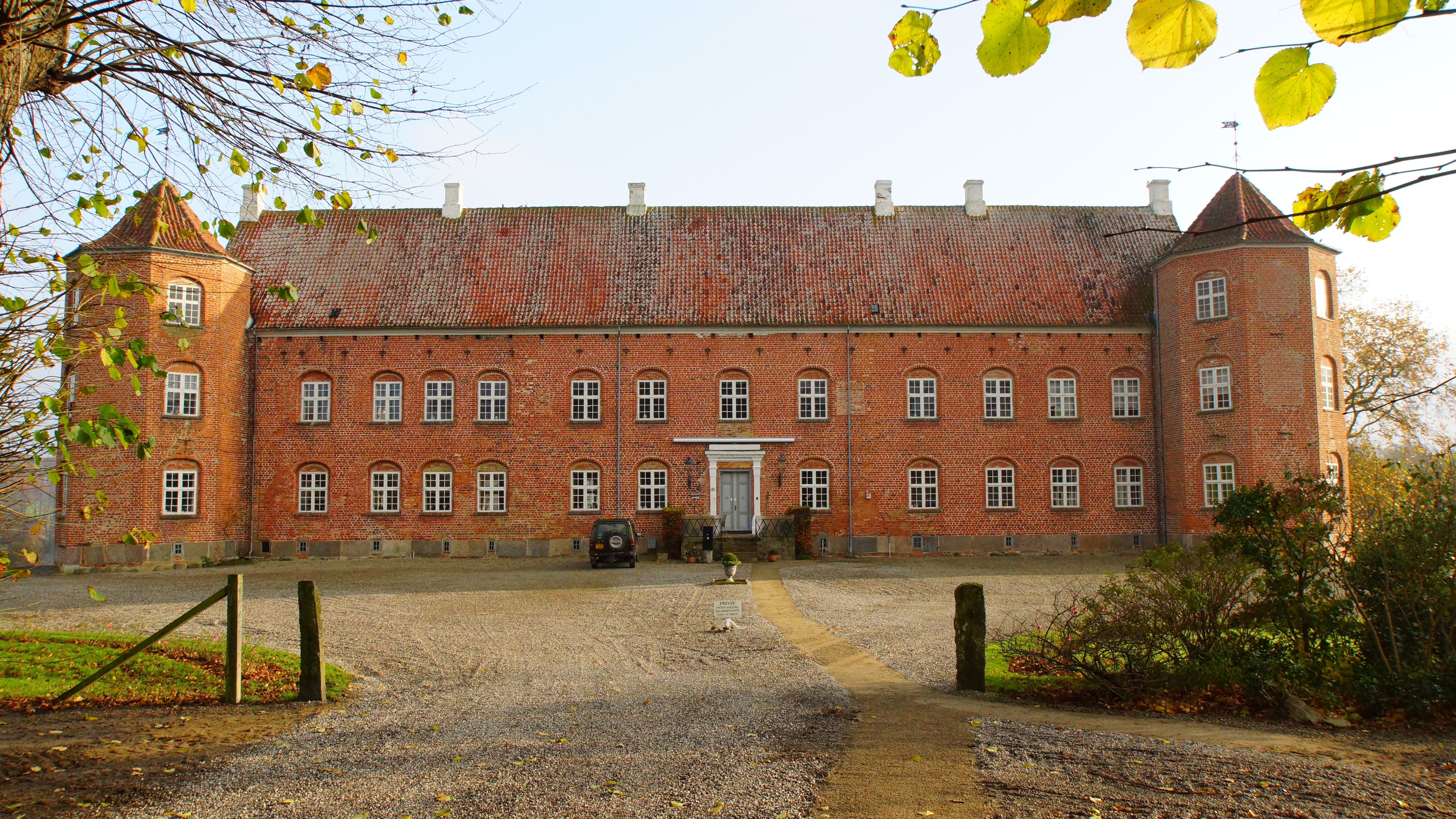 Rugård Slot 10.11.14, forfra, 1